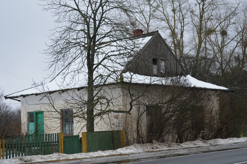 Комплекс зданий почтовой станции в д. Боровая Бобруйского района, XIX век